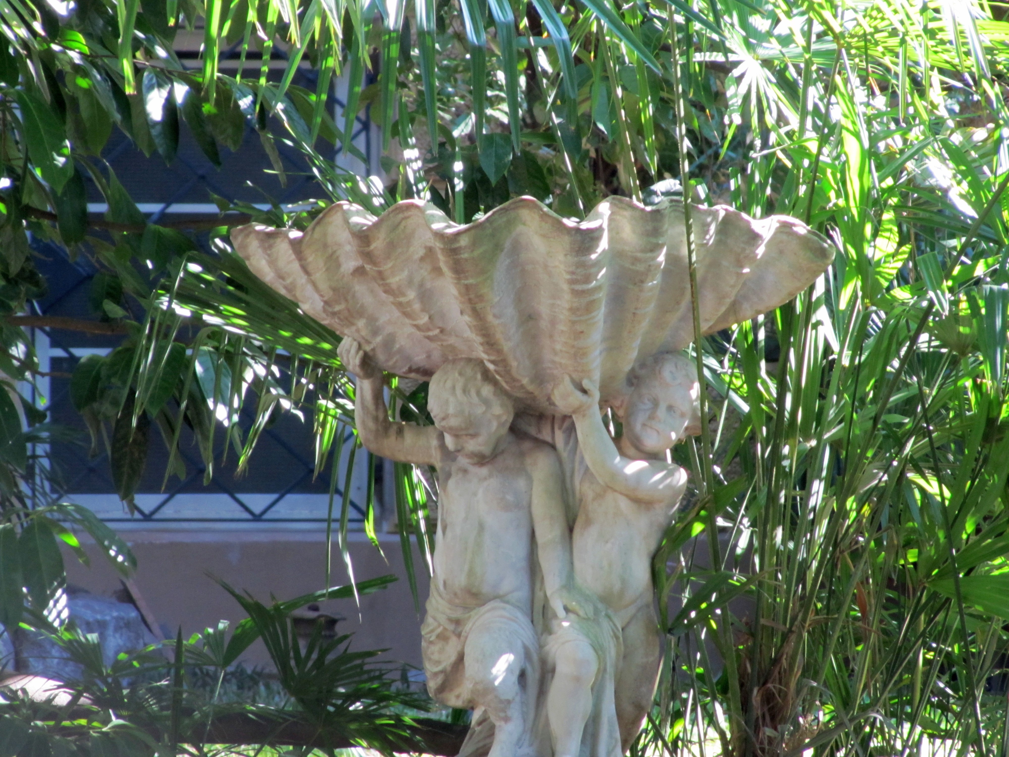 Villa Stoddard, Grabmayrstraße 11-13